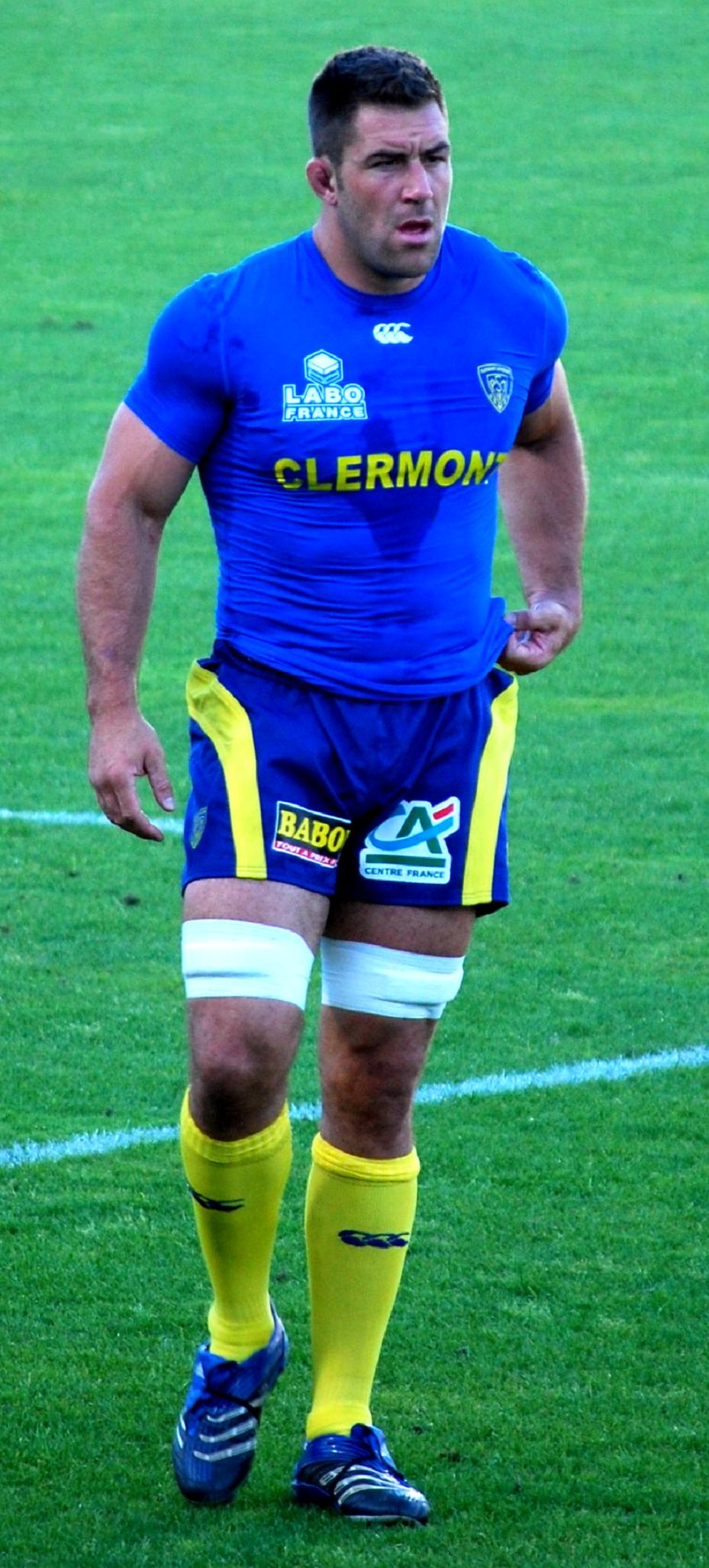 Jamie Cudmore lors de la demi-finale de top 14 2008-2009 opposant Clermont à Toulouse